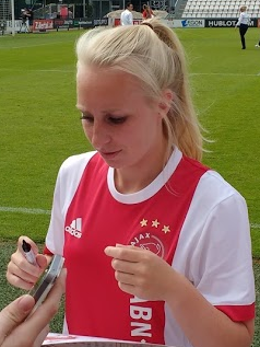 Inessa Kaagman, signeert na afloop van de wedstrijd Ajax-PSV